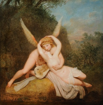 Amore e Psiche